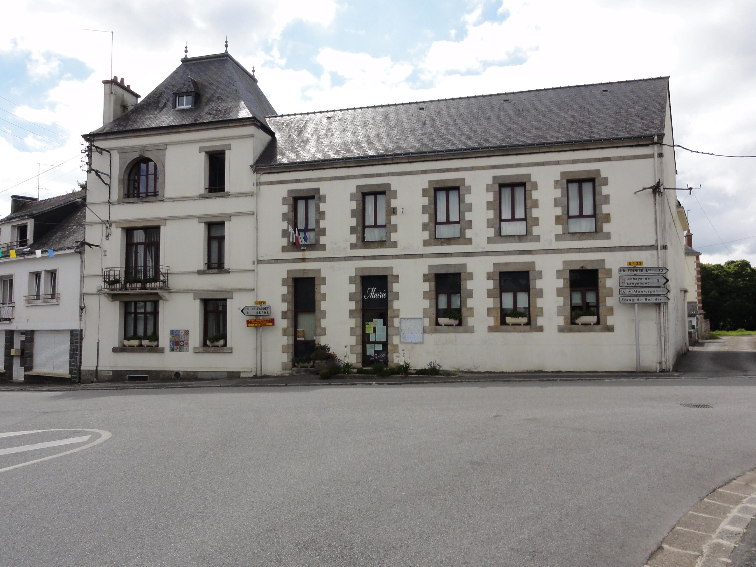 Batiment de la Mairie de Priziac en Bretagne (France)